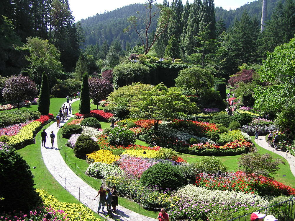 The Butchart Gardens (Sunken Garden) (16.08.06)